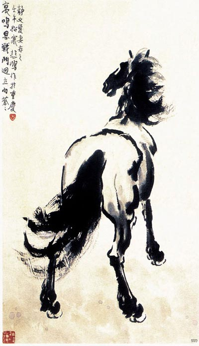 徐悲鸿作品《战马》